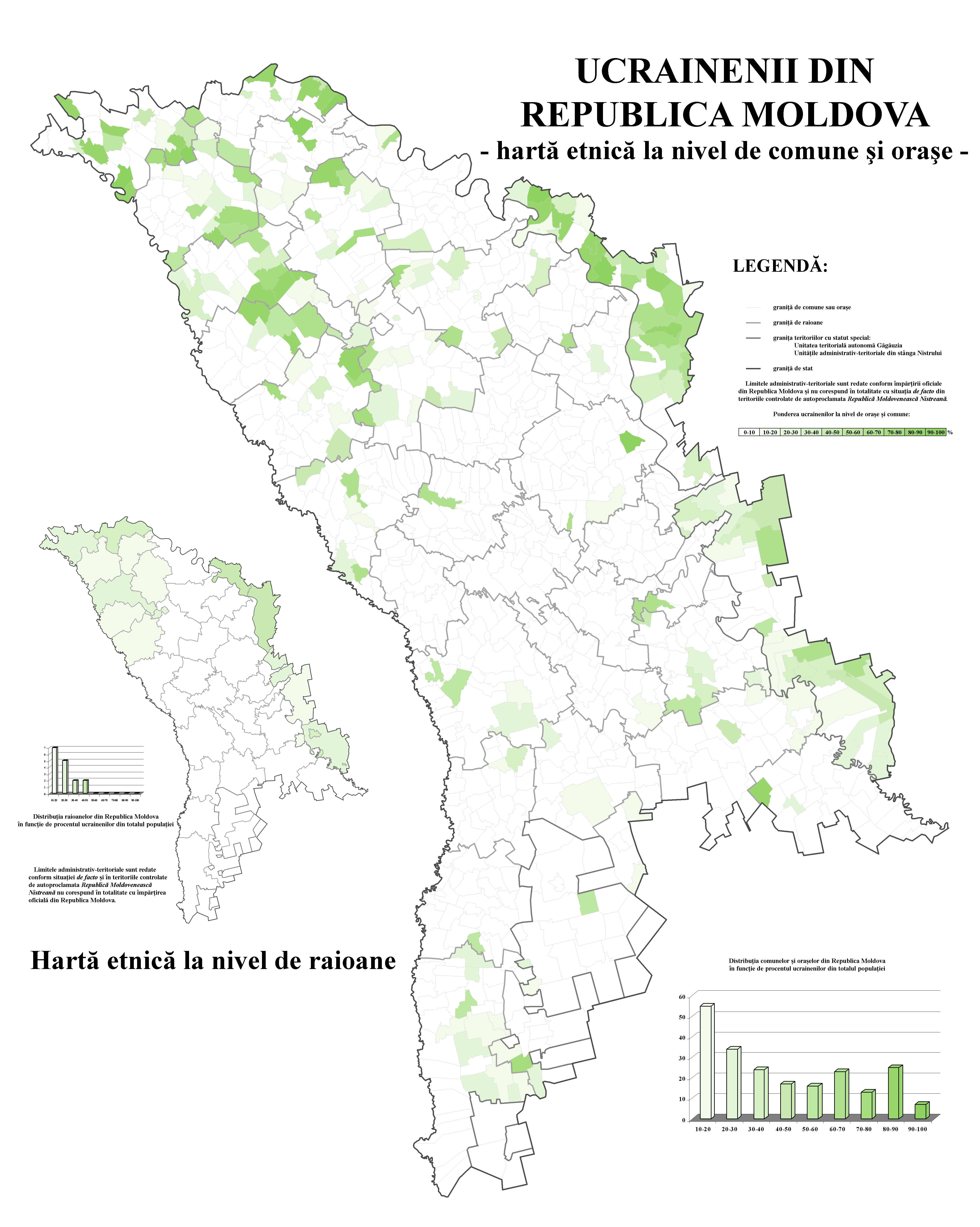 Ponderea ucrainenilor în Republica Moldova la nivel de comune conform datelor recensământului din 2004